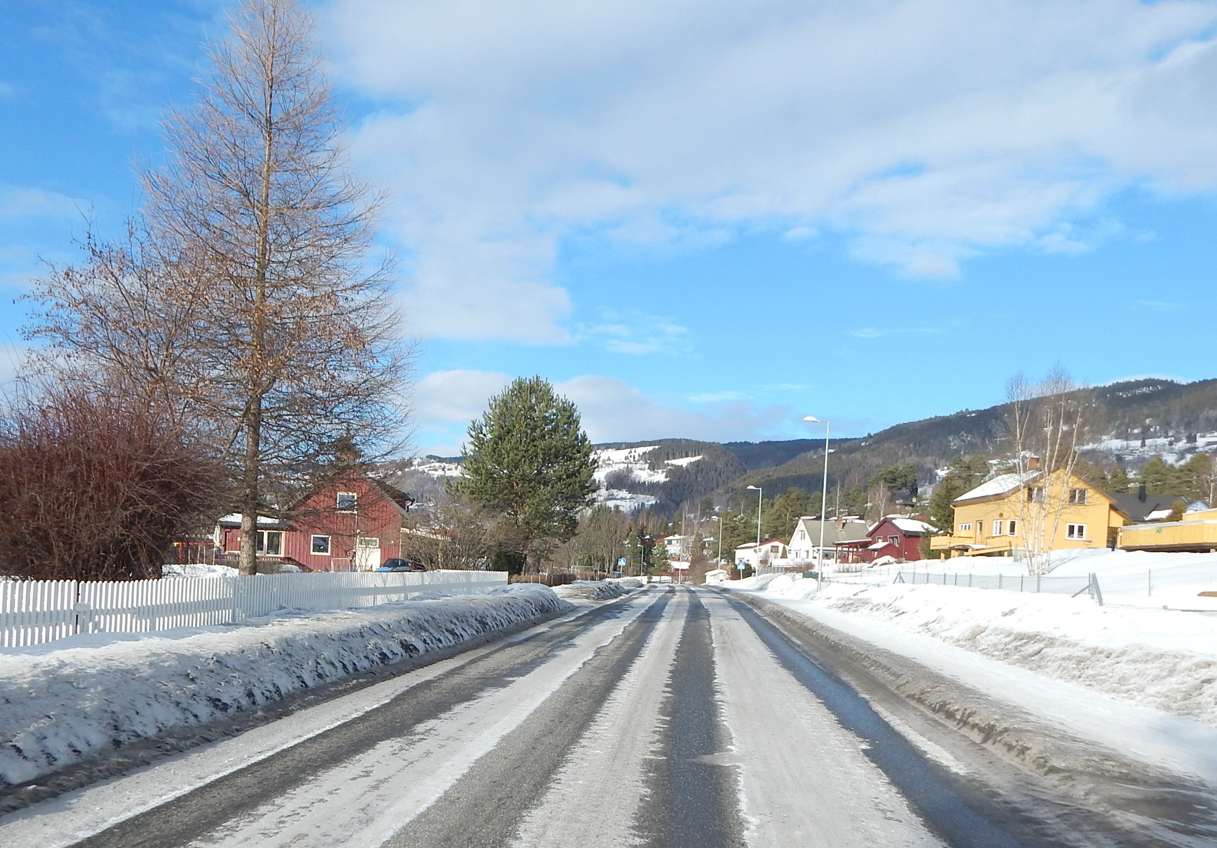 Fylkesvei 2522 (tidl. 312) gjennom Granrudmoen (Øyer sentrum)